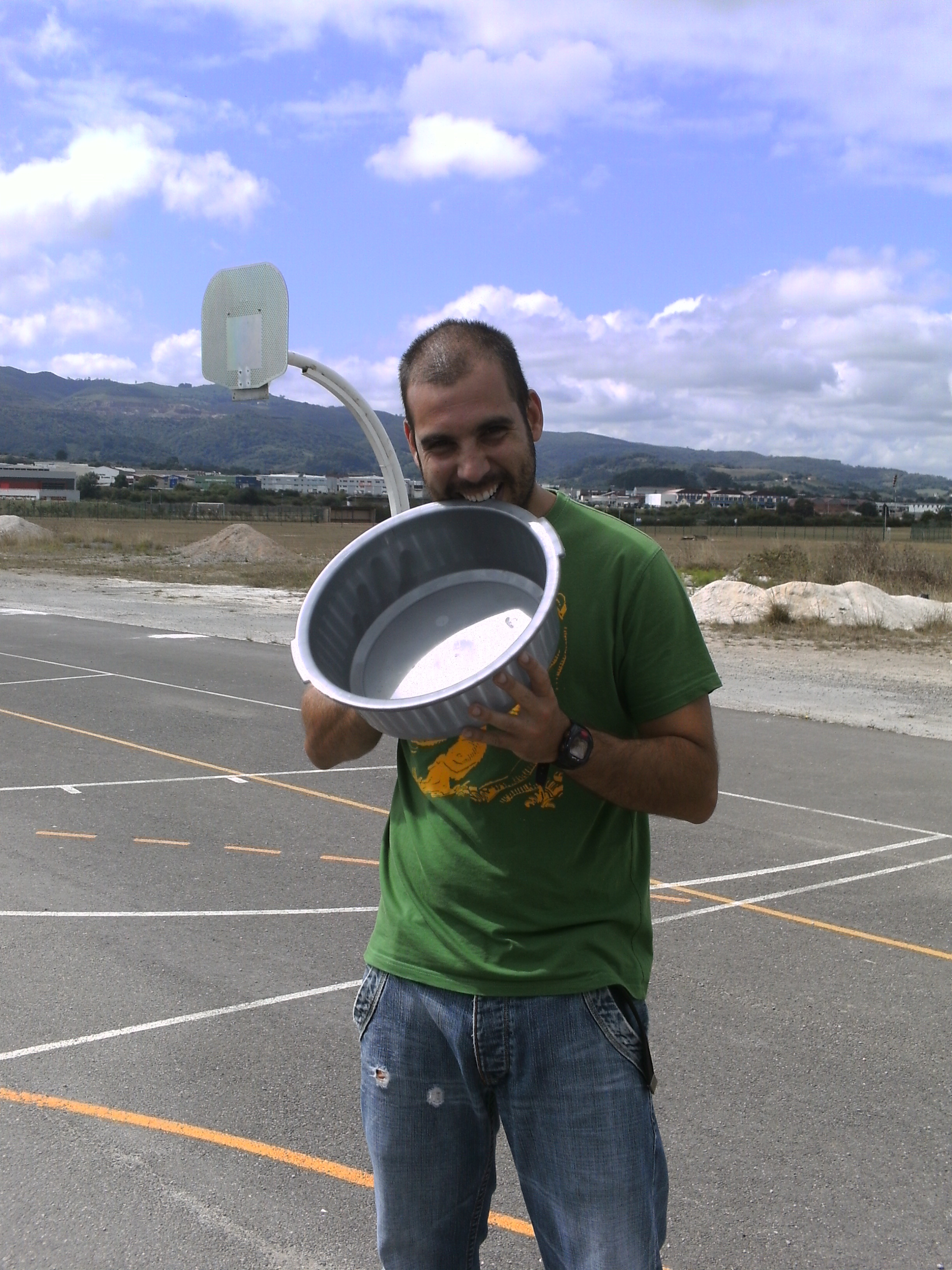 Toño, de los Sidrones, ganador del II Abiertu'l Barreñón de Liriu. LLamorgal, 28-VIII-2010.